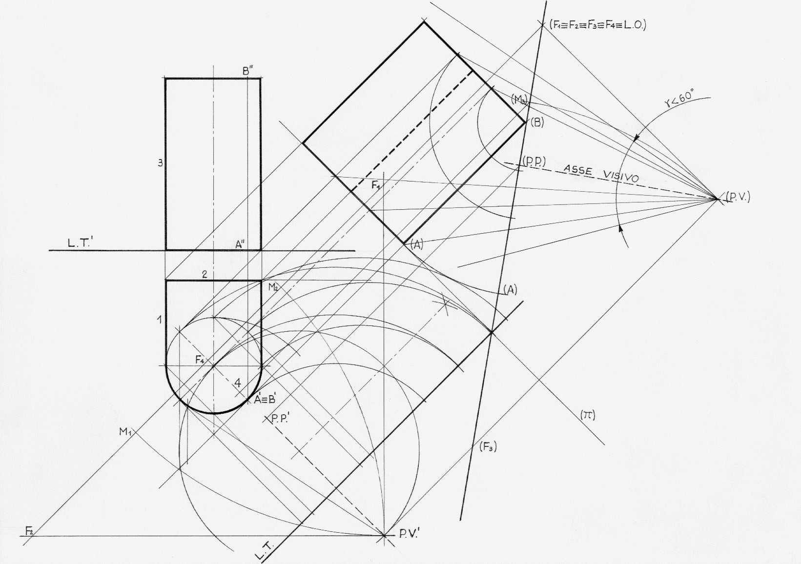 Tavola preparatoria per l'esecuzione della prospettiva a quadro obliquo dall'alto del solido rappresentato. Il file è stato creato scandendo il disegno con uno scanner.